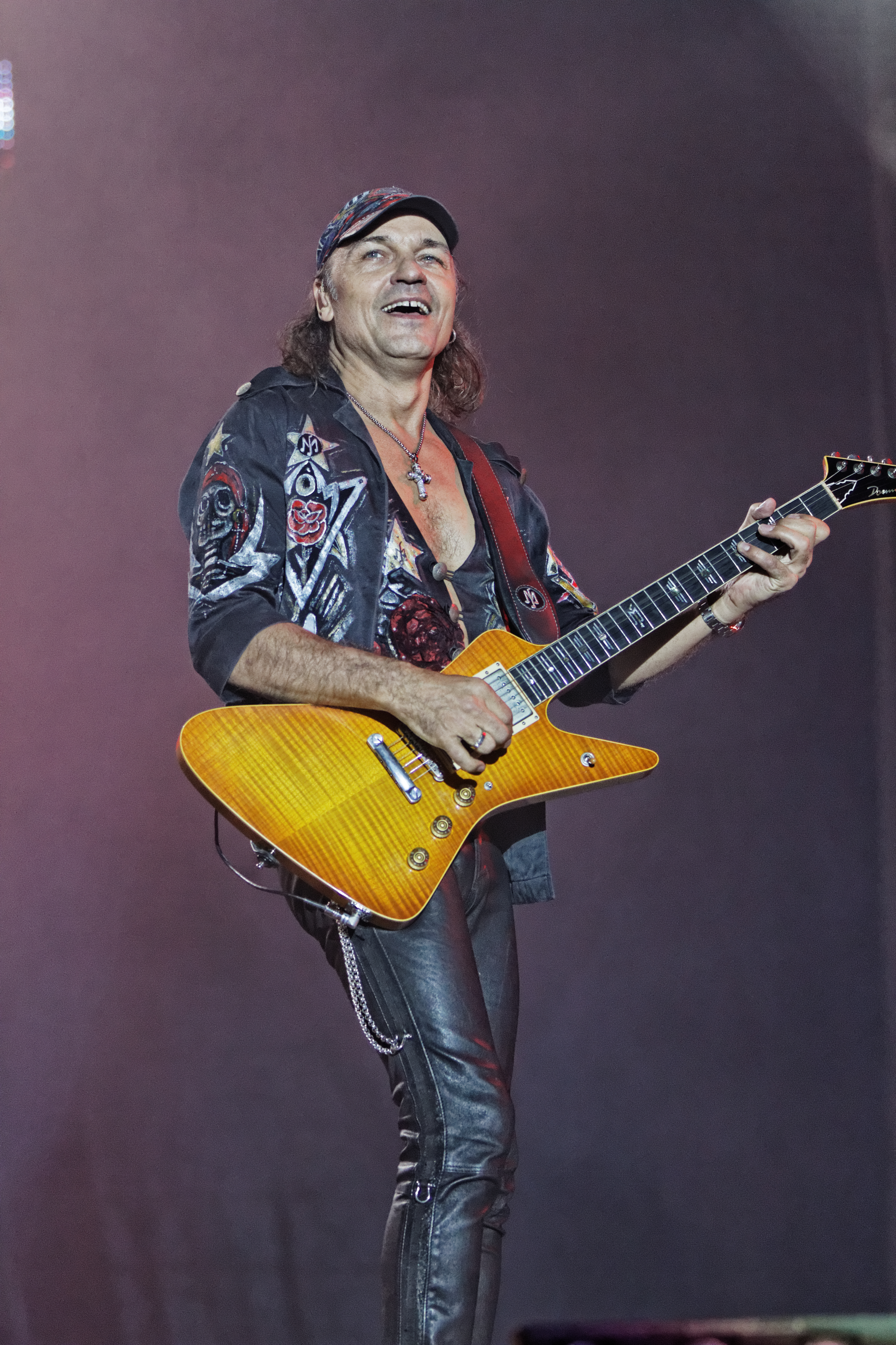 Scorpions en concert sur la grande scène lors de la fête de l'Humanité 2014.